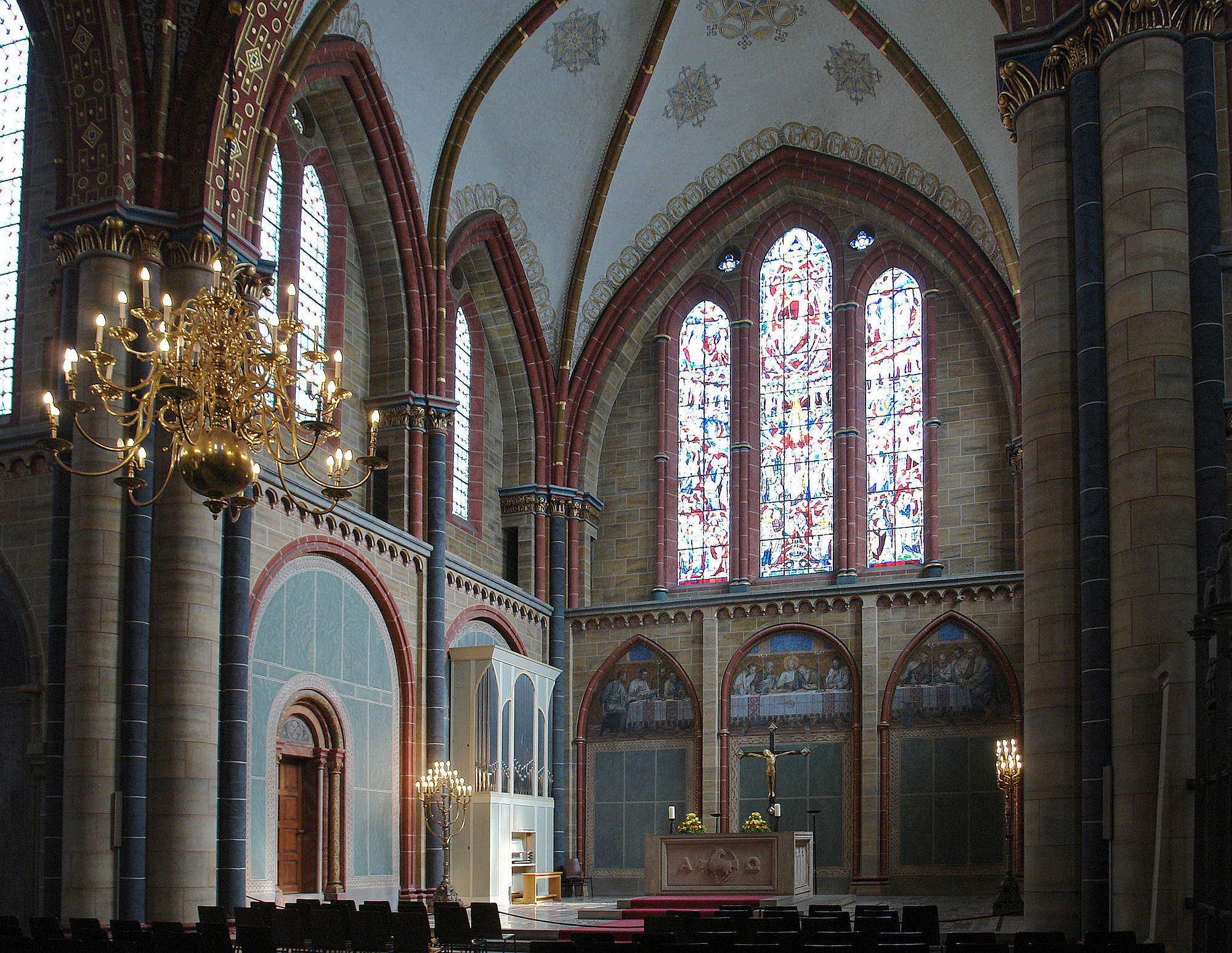 St. Petri Dom in Bremen: Ost-Chor mit Hauptaltar und Wegscheider-Orgel